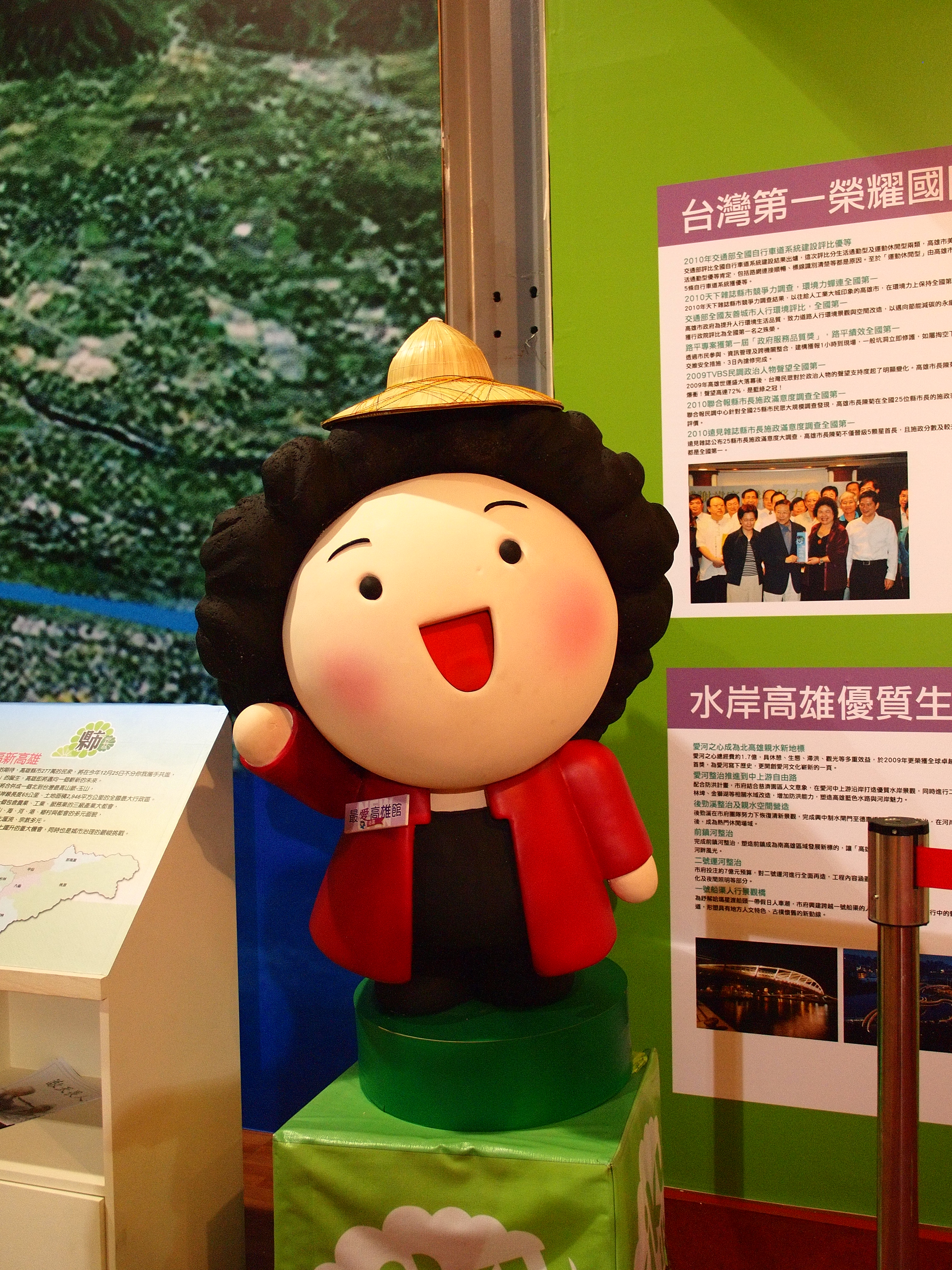 花媽